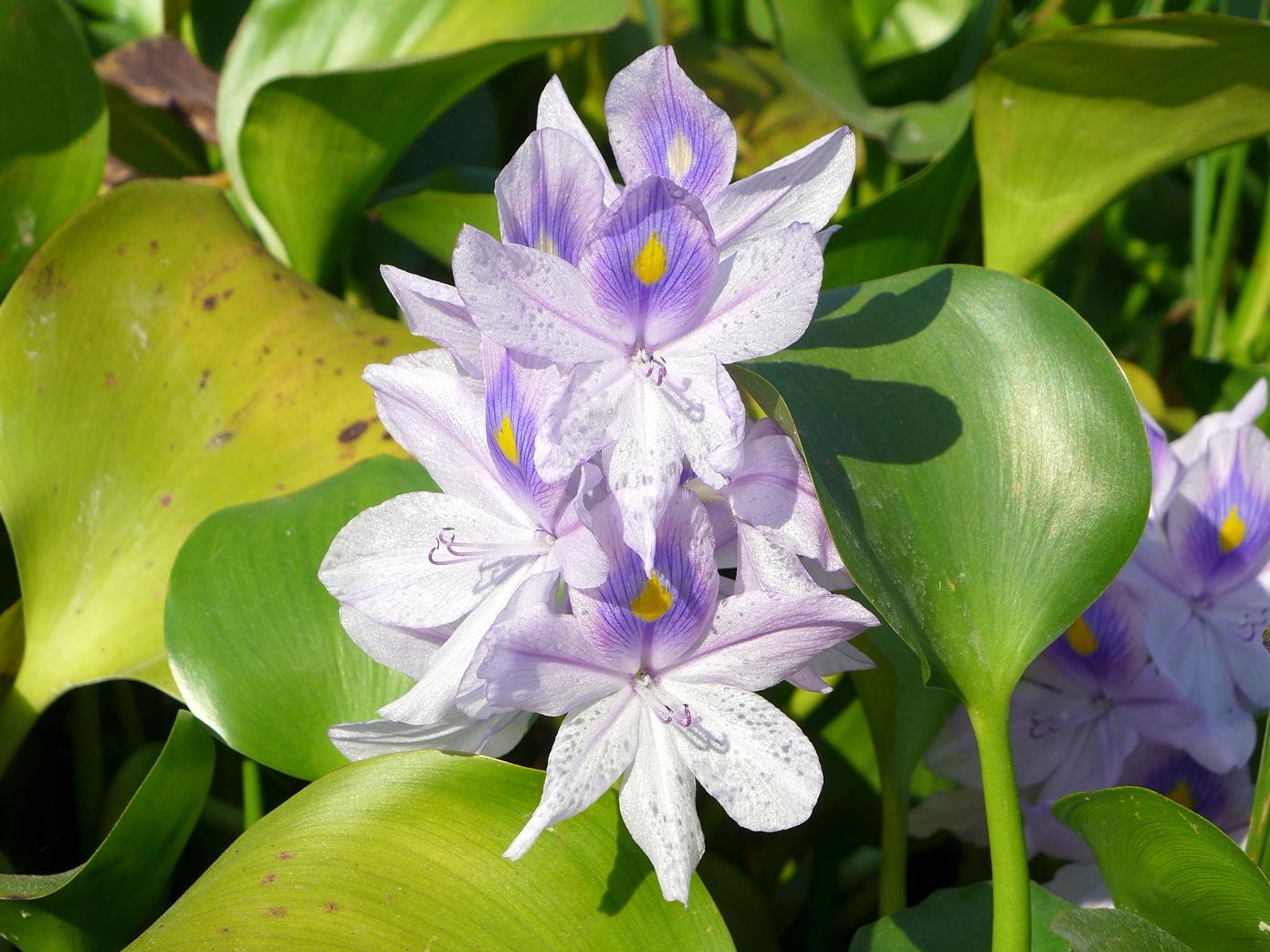 Eichhornia crassipes